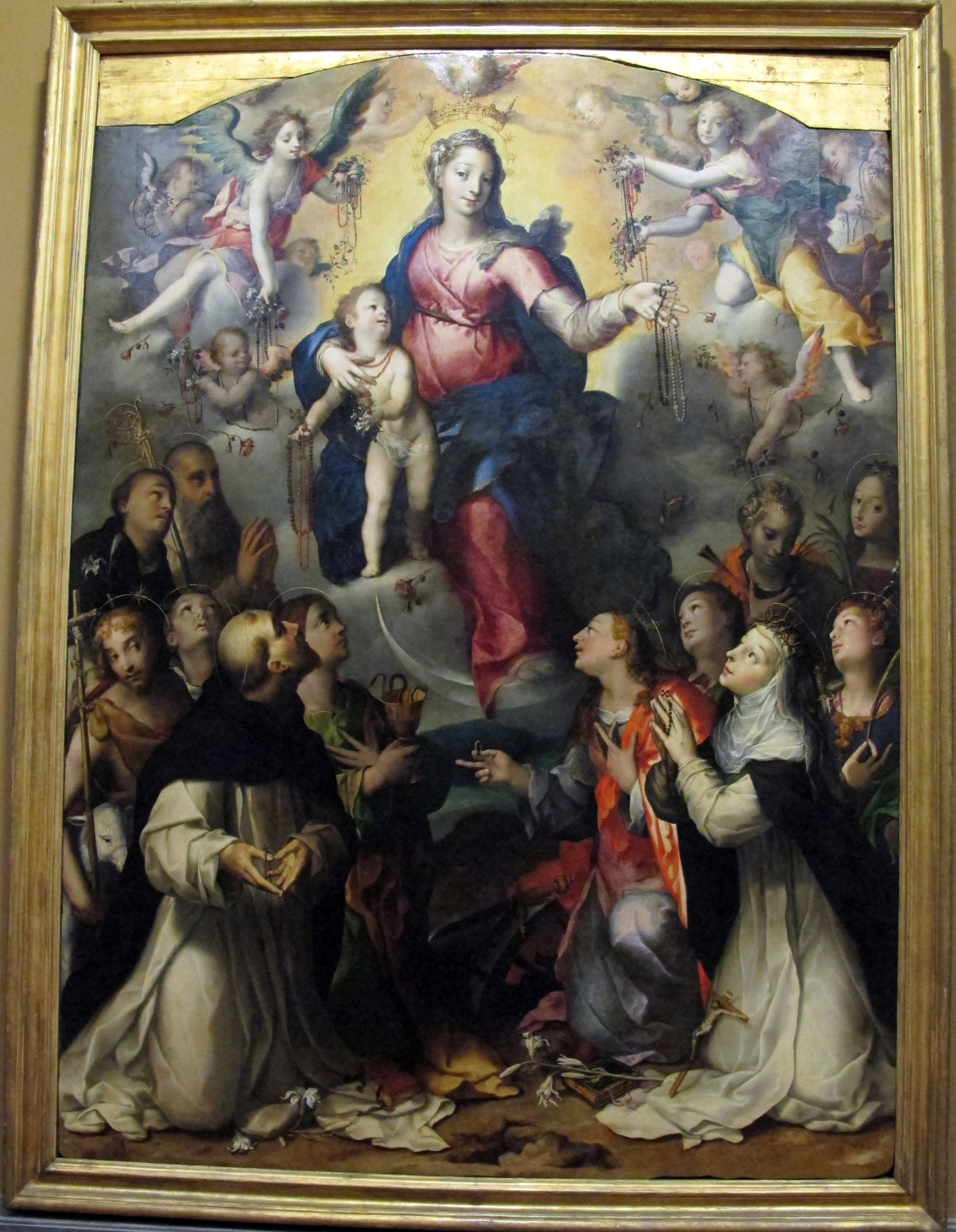 Galleria Farnese (Museo di Capodimonte)